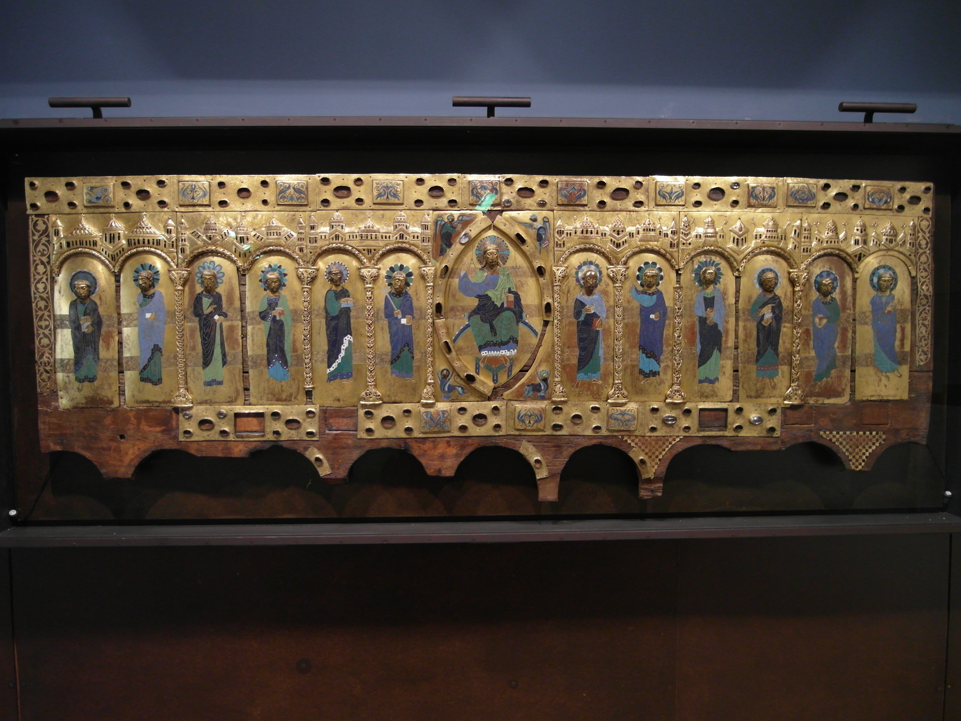 Urna de Santo Domingo, taller de Silos, hacia 1165-1170. Del monasterio de Santo Domingo de Silos. Museo de Burgos.